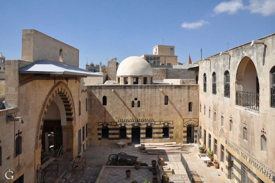 La cour principale de la maison Ghazaleh à Alep entourée de l'Iwan, la Qa'a et la façade nord